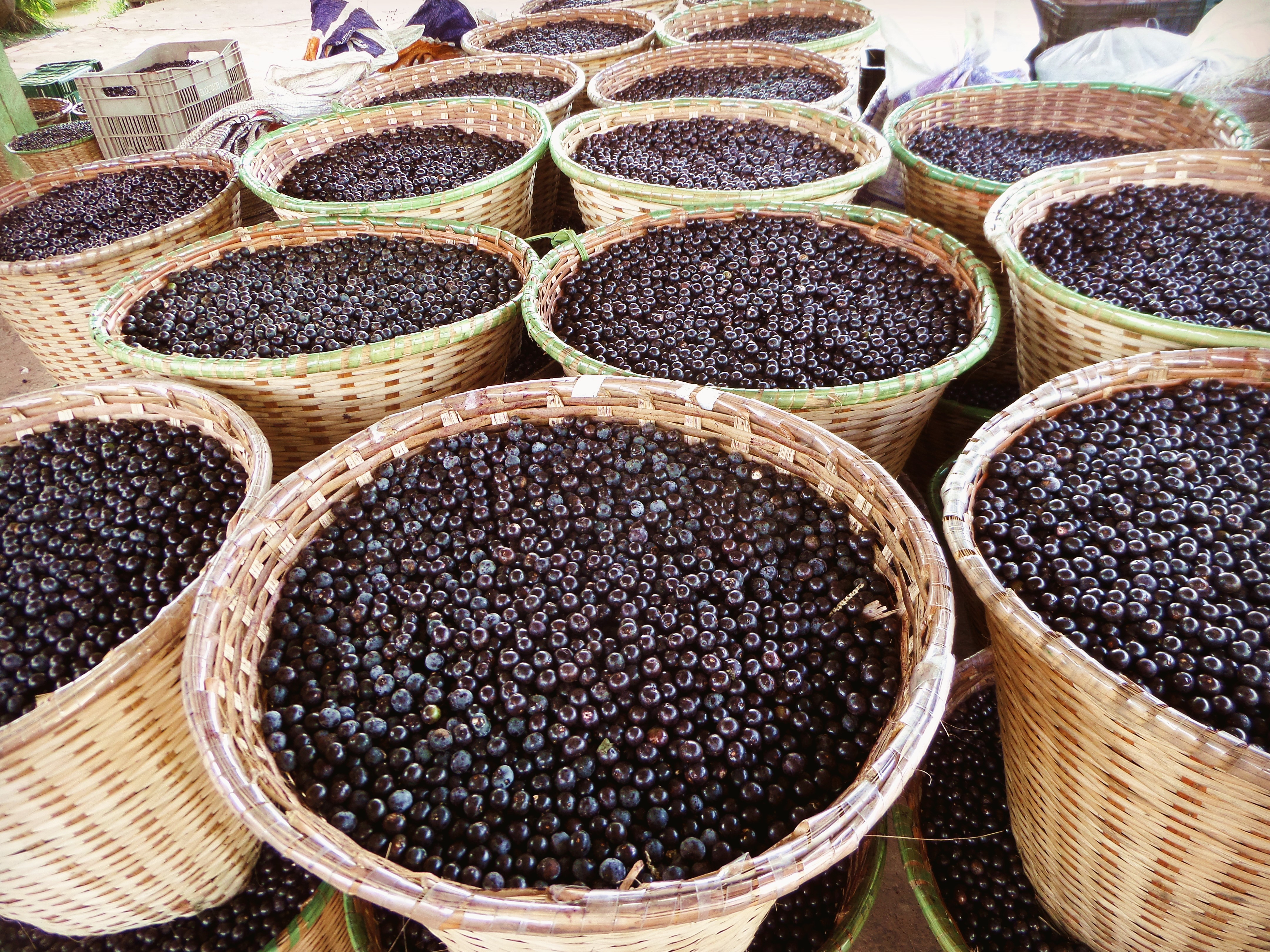 Paneiros de açaí